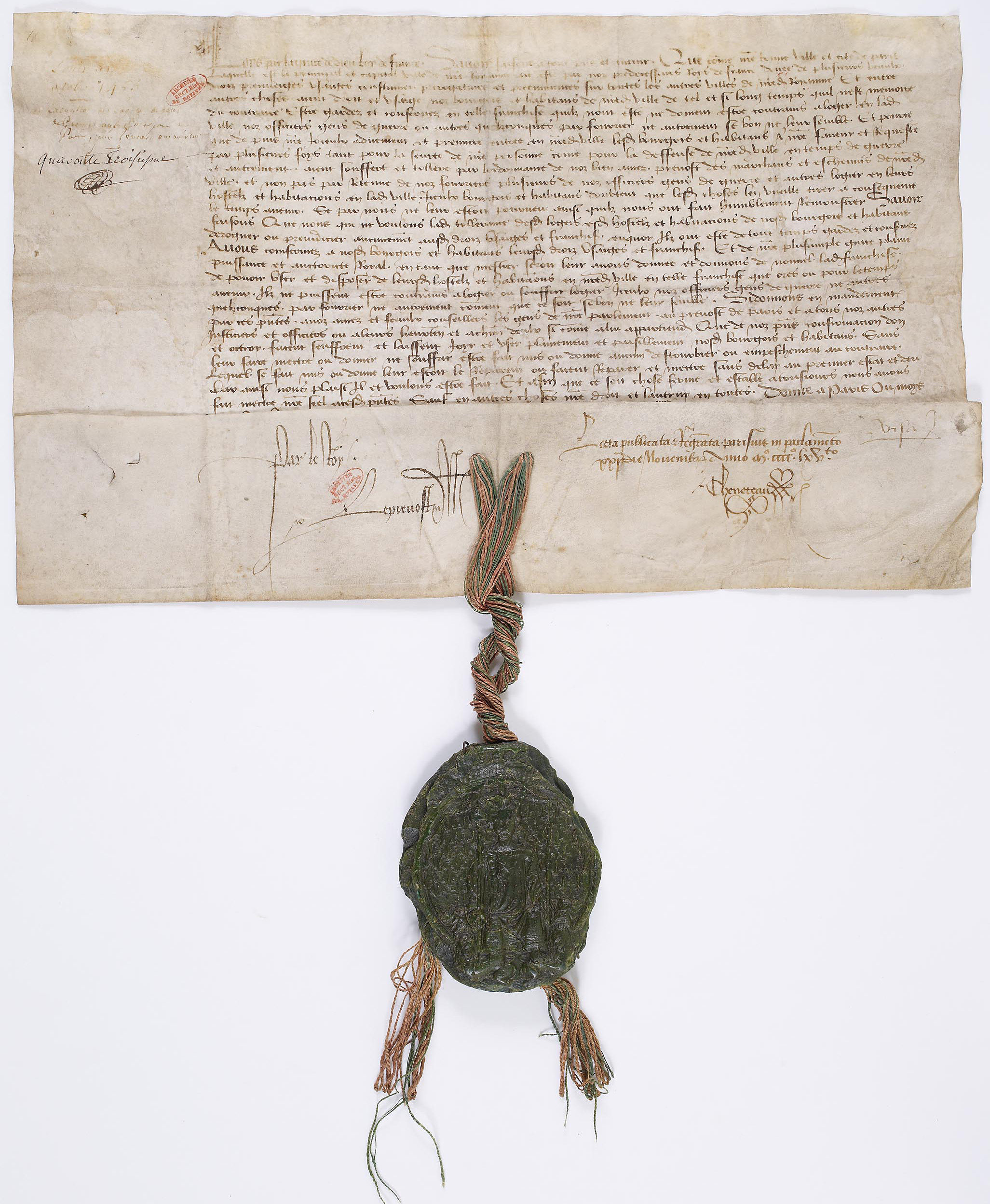 Edit de Louis XI d'octobre 1465 confirmant les privilèges des bourgeois de Paris.